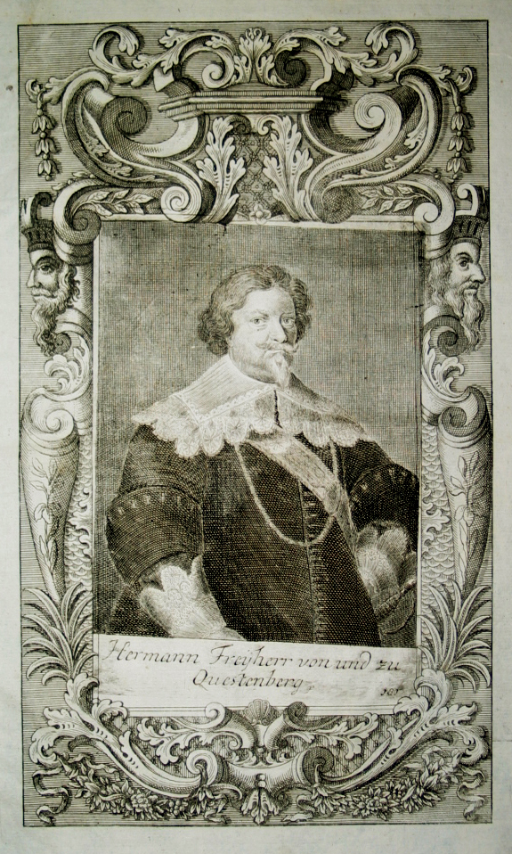 Hermann Freiherr von Questenberg: Hermann Freyherr von und zu Questenberg